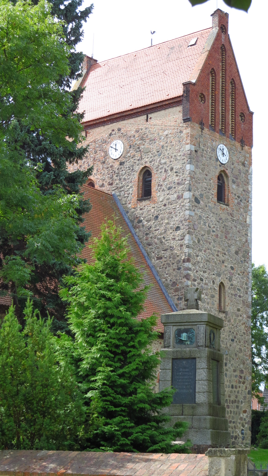 Blumberger Kirche, Nr. 8 in der Liste der Baudenkmale in Blumberg bei Ahrensfelde